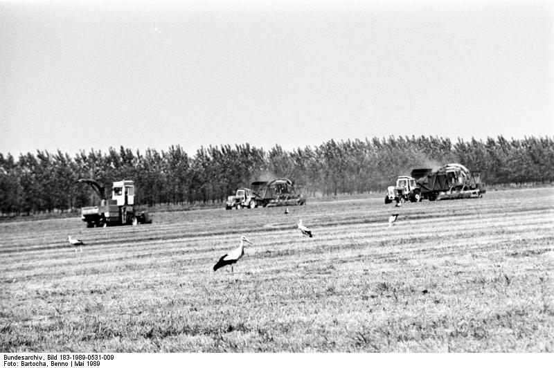 VEG Ferdinandshof, Futtermittelernte ADN-ZB/Bartocha 31.5.89 Bez. Neubrandenburg: Ernte Der erste Schnitt wird gegenwärtig im VEG (P) Ferdinandshof, Kreis Ueckermünde, von 4.000 Hektar Grünland eingebracht. 20 Schwadmäher und 16 Häcksler sind in verlängerter Schicht und auch an Wochenenden im Einsatz. 420 Dezitonnen je Hektar ist das Ernteziel der Ferdinandshofer für die insgesamt drei Schnitte dieses Jahres. Die Grünlandbrigaden des VEG beliefern die Kooperationspartner im Einzugsbereich mit ausreichend Grünfütter für rund 42.000 Rinder.